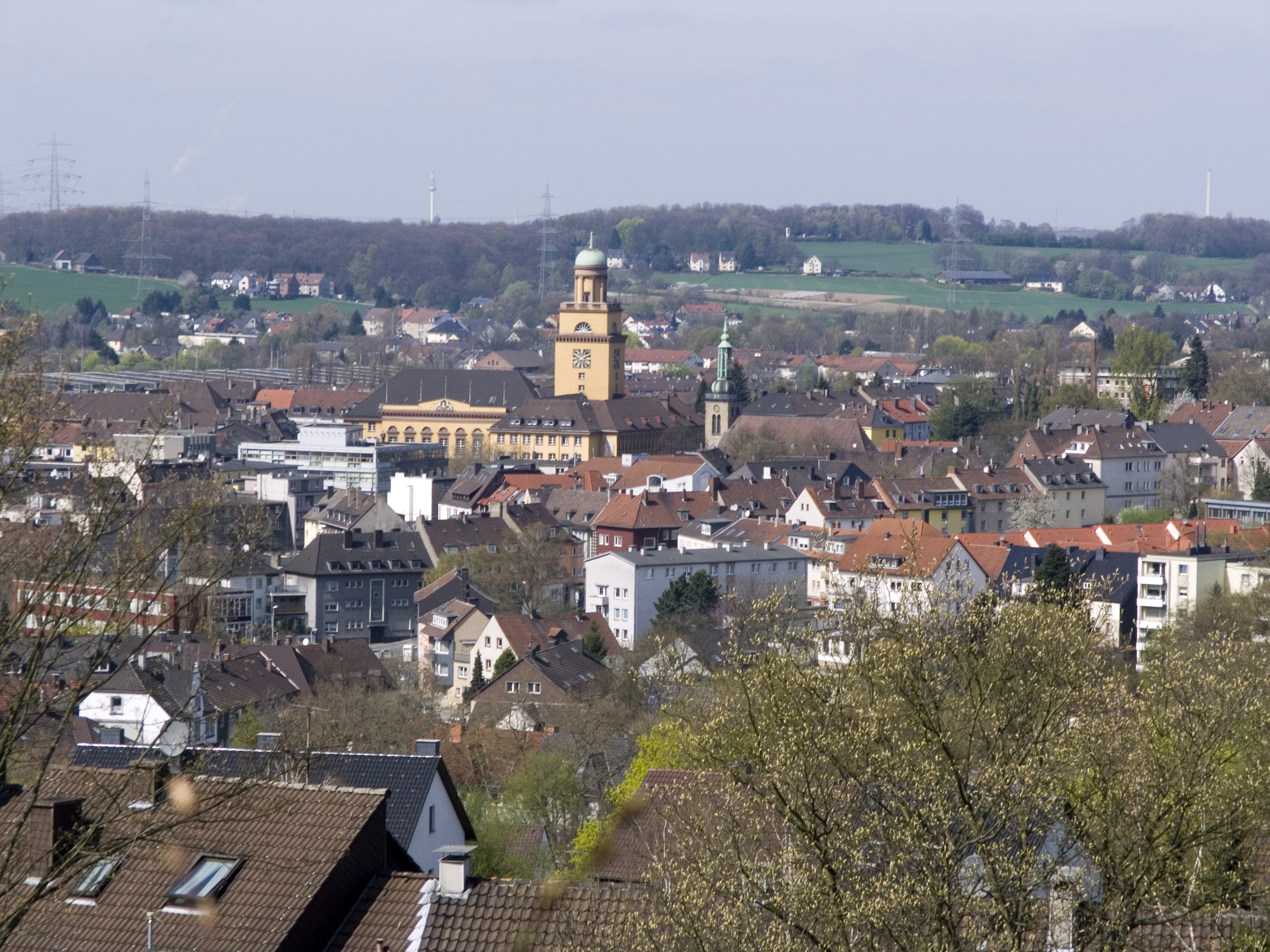 Северный Рейн - Вестфалия, Виттен - башня Елены (вид на город)